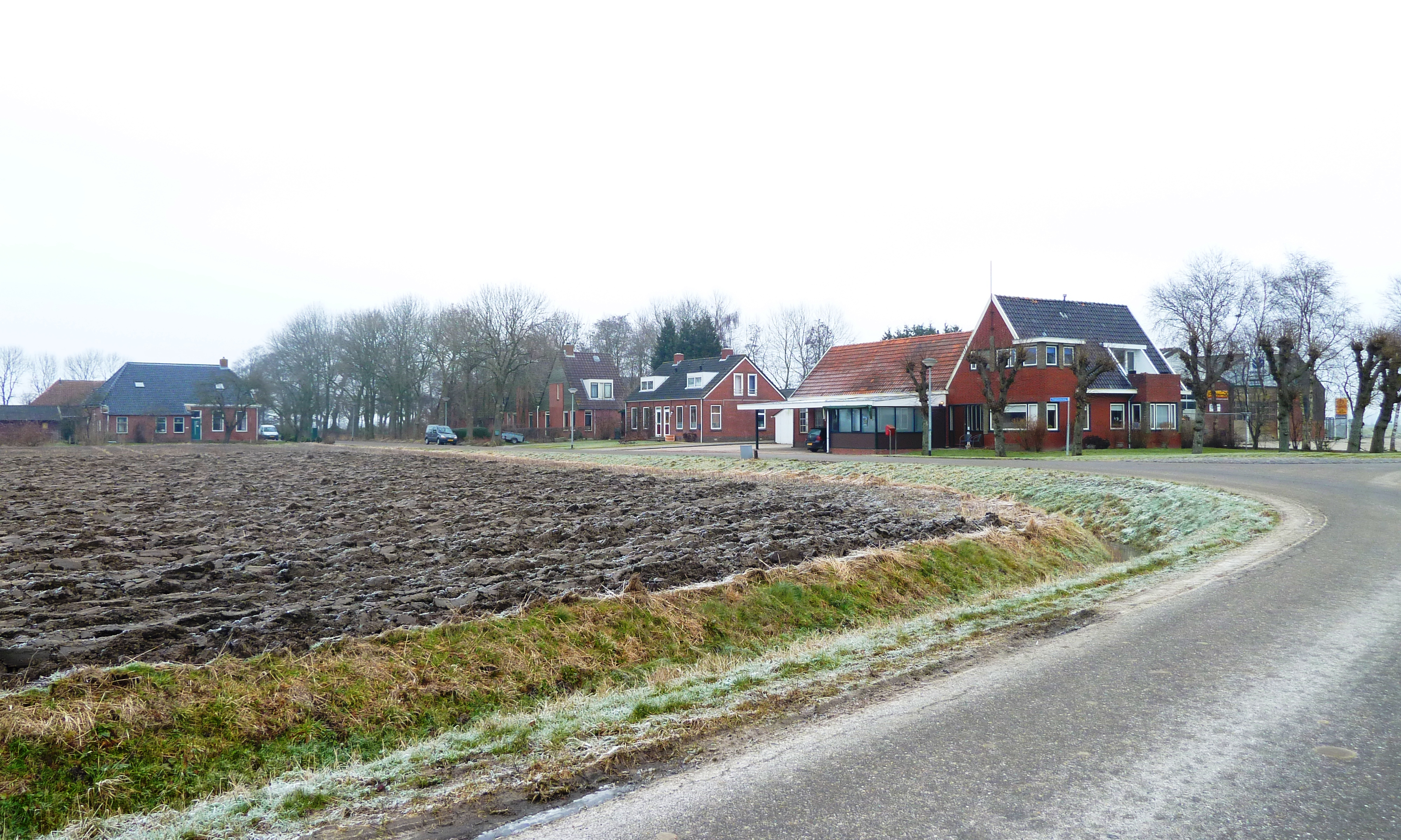 Huizen in Paapstil (Oldenzijl, Eemsmond, Groningen, Nederland).